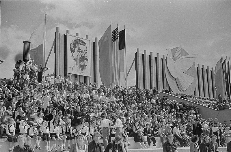 Original image description from the Deutsche Fotothek Blick auf die Ehrentribüne bei der Sportlerparade auf dem Marx-Engels-Platz (heute: Schlossplatz)